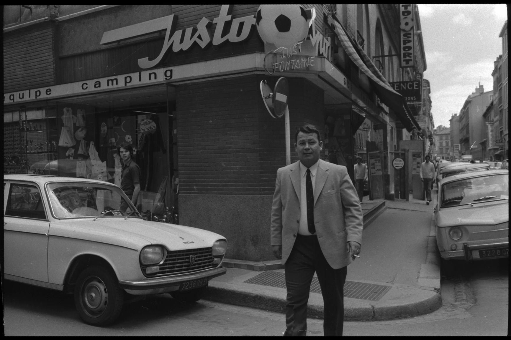 Quartier Saint-Georges. 7 Juillet 1971. Vue de Just Fontaine devant son magasin de sports "Justosport".